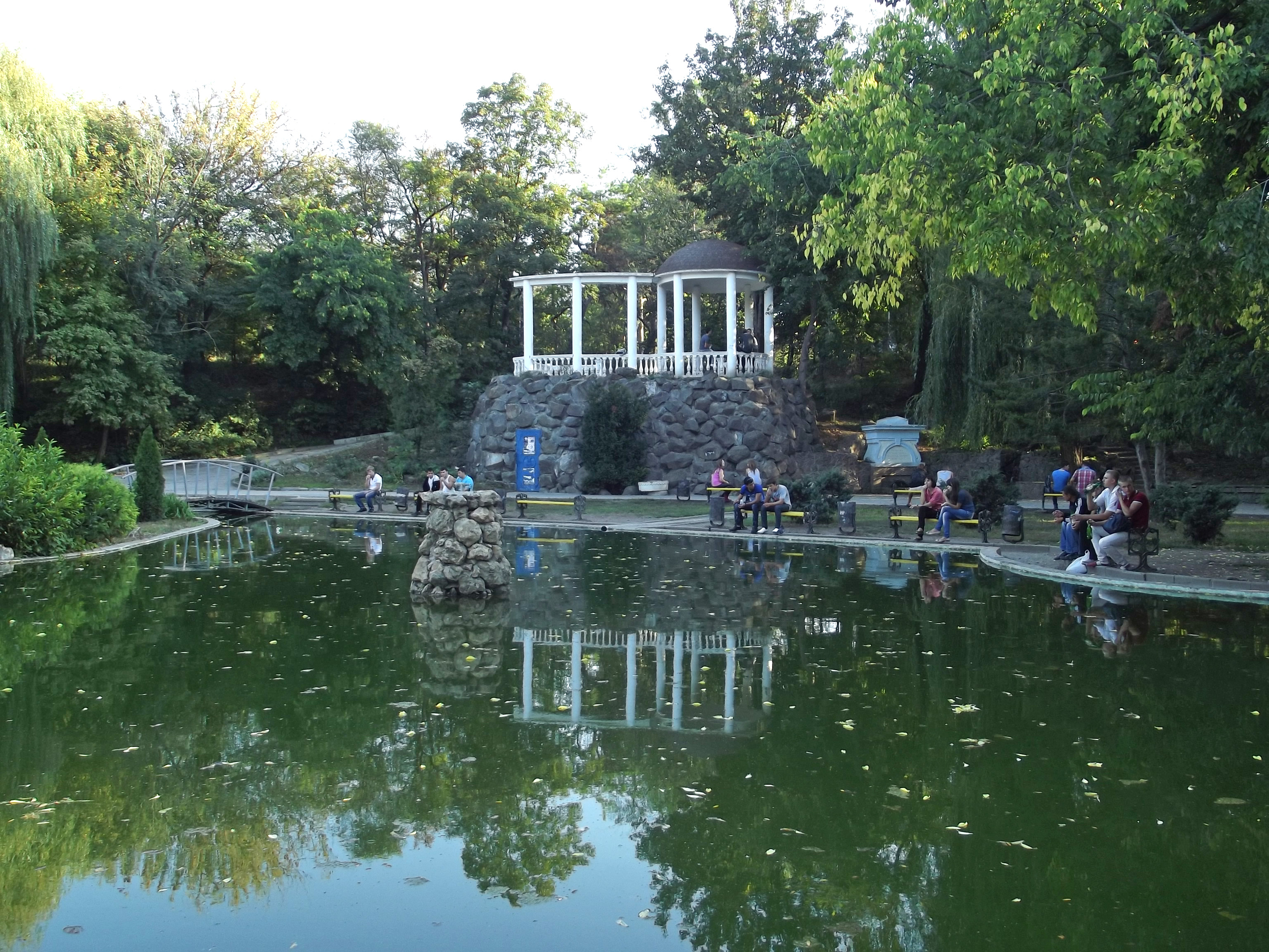 В Центральном парке